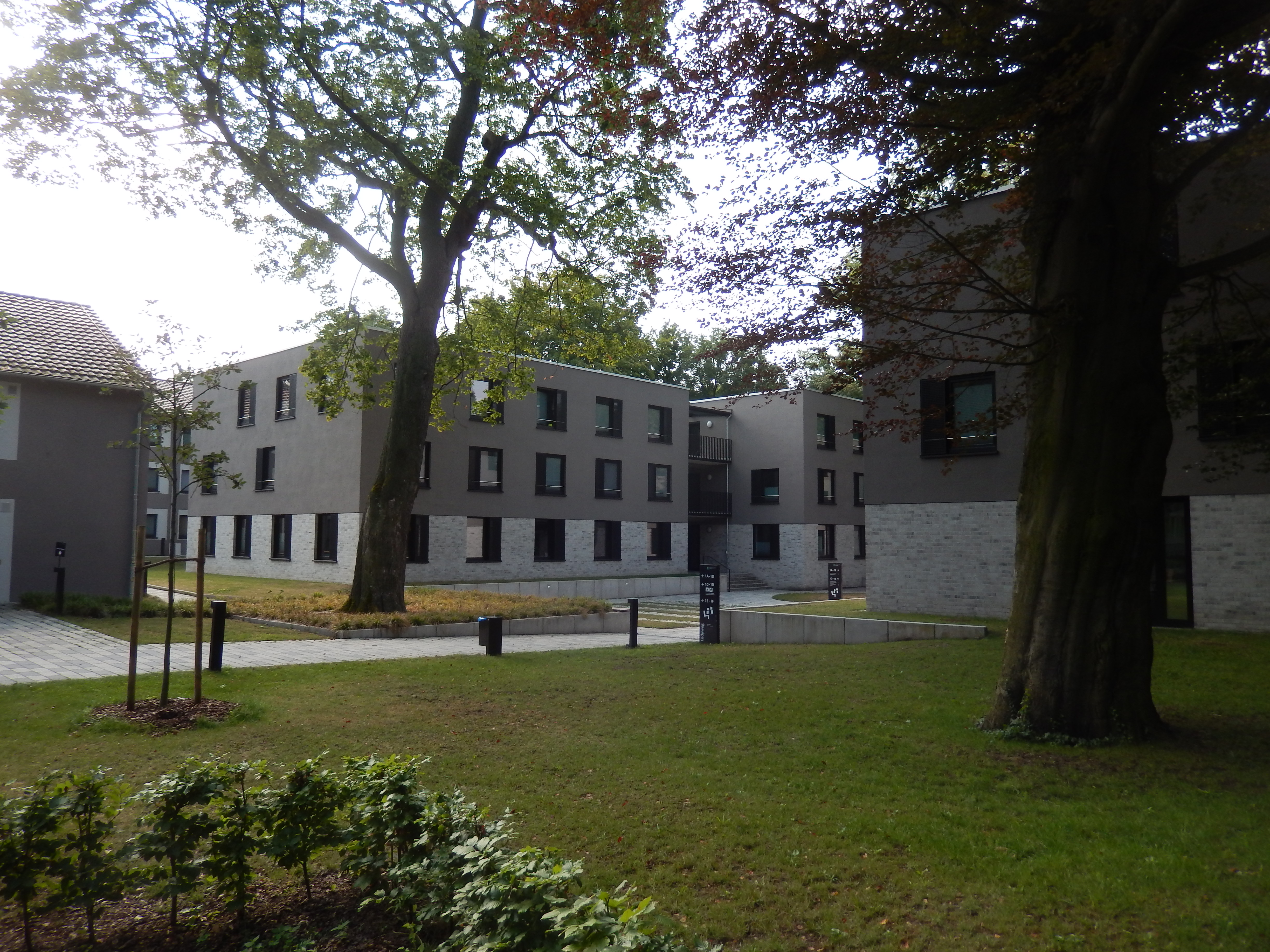 Studentenwohnheim und Studentenwerk-Verwaltung im Lodyweg in Hannover